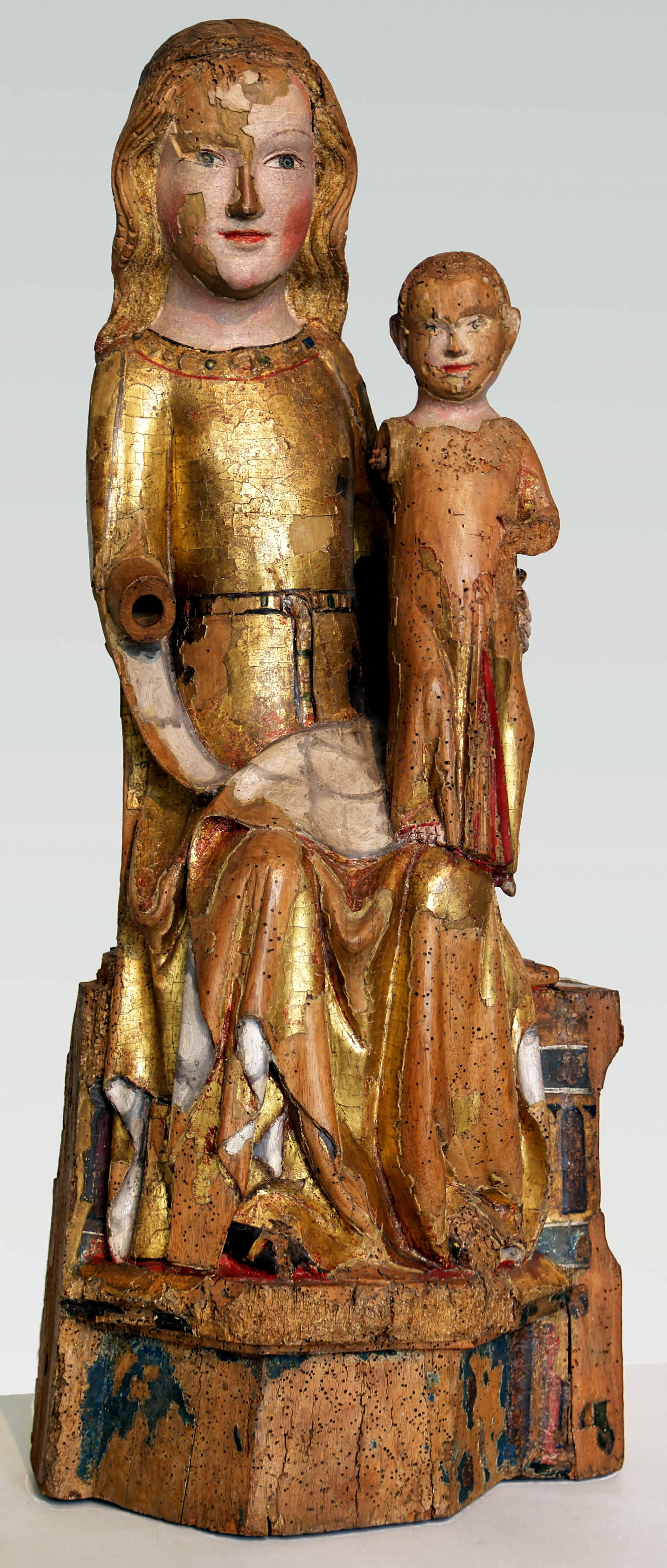 Dattenfelder Muttergottes, Köln, 1. Hälfte 14. Jahrhundert, Nussbaumholz mit alter Fassung Kolumba Native nameKolumba - Kunstmuseum des Erzbistums KölnParent institutionlist of museums in Cologne LocationCologneCoordinates50° 56′ 18.3″ N, 6° 57′ 15.4″ E EstablishedSeptember 2007 Web pageKolumbaAuthority control : Q1621165 VIAF: 154257346 LCCN: n2006055047 GND: 2044624-X WorldCat institution QS:P195,Q1621165